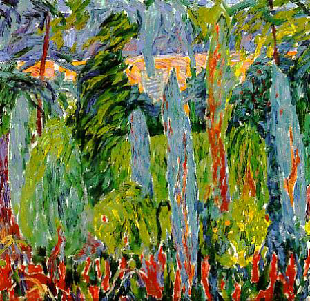 t